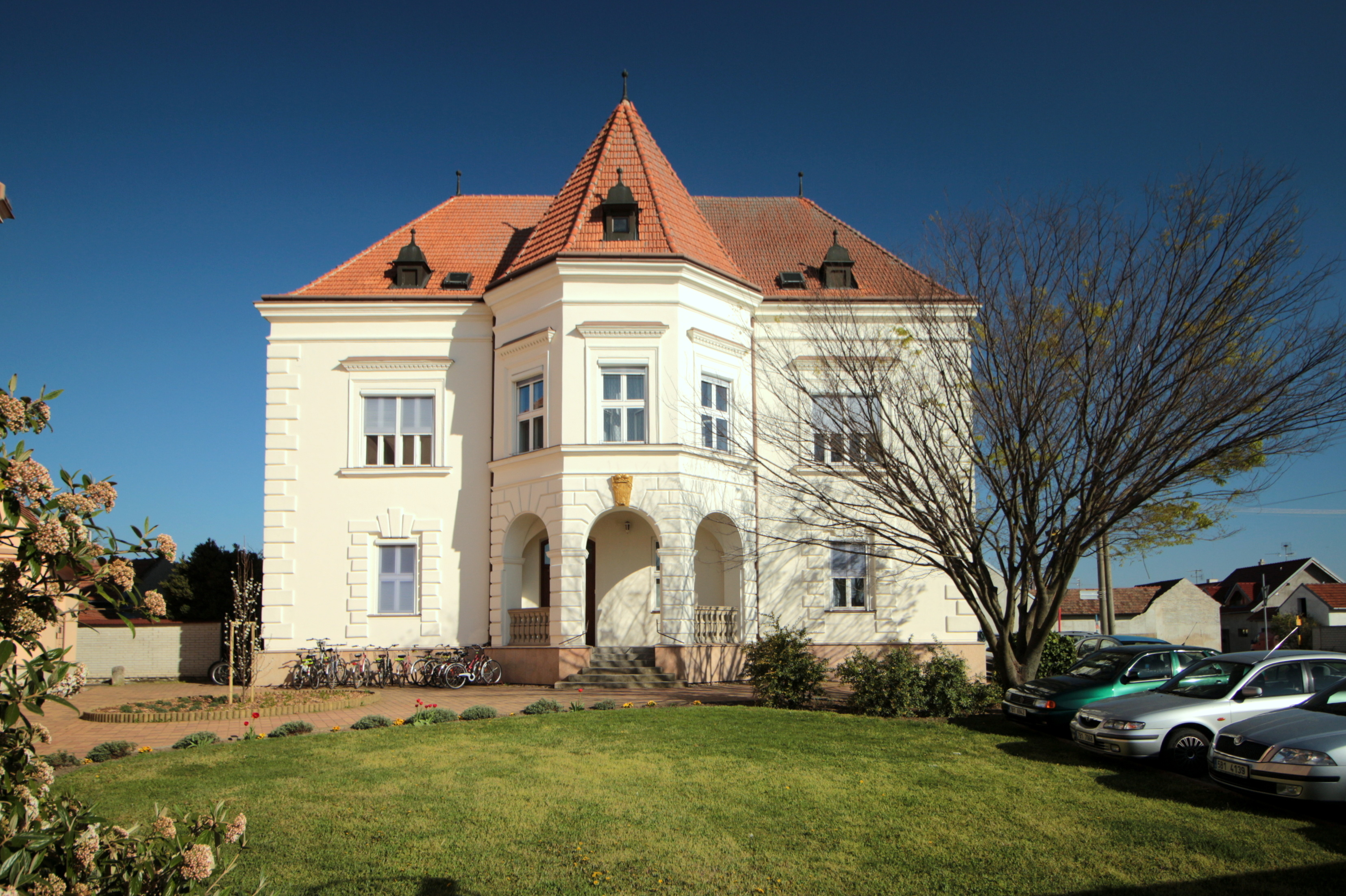 Velké Bílovice, Žerotínovo náměstí